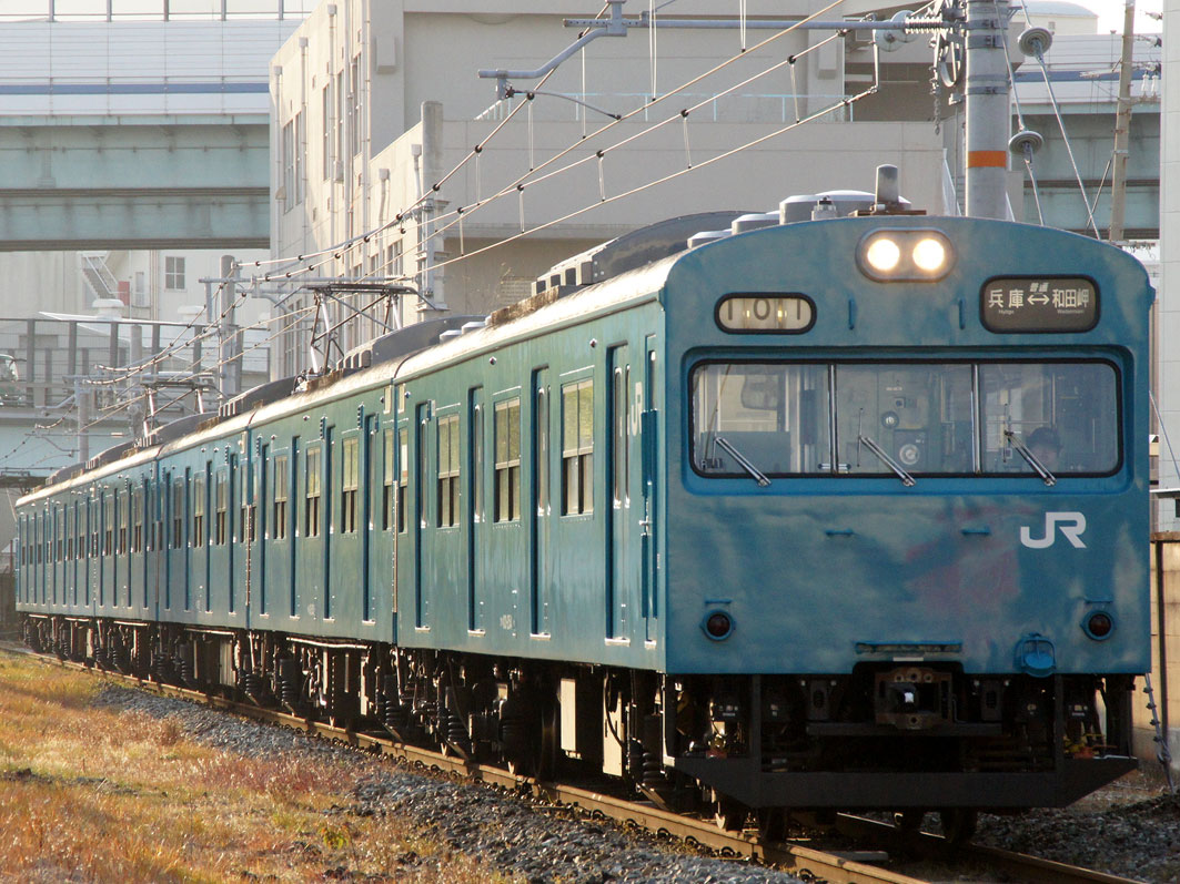 和田岬線を走行する103系